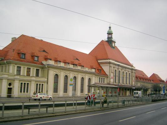 Bahnhof Görlitz selbst erstellt und auf veröffentlicht